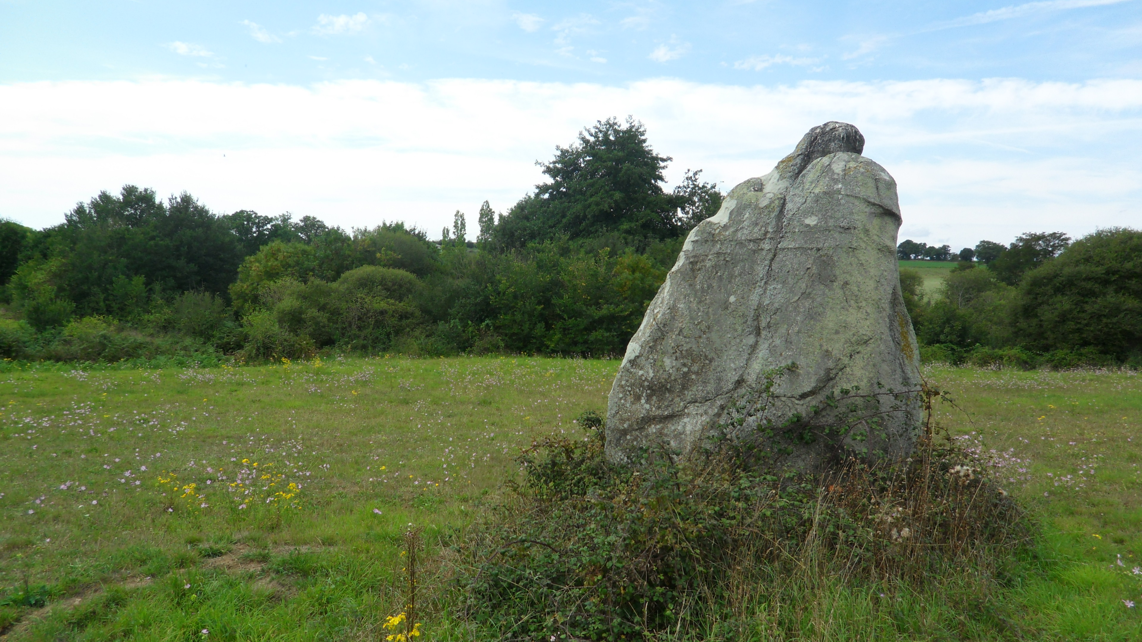 Monument historique de Maulévrier dans le Maine-et-Loire